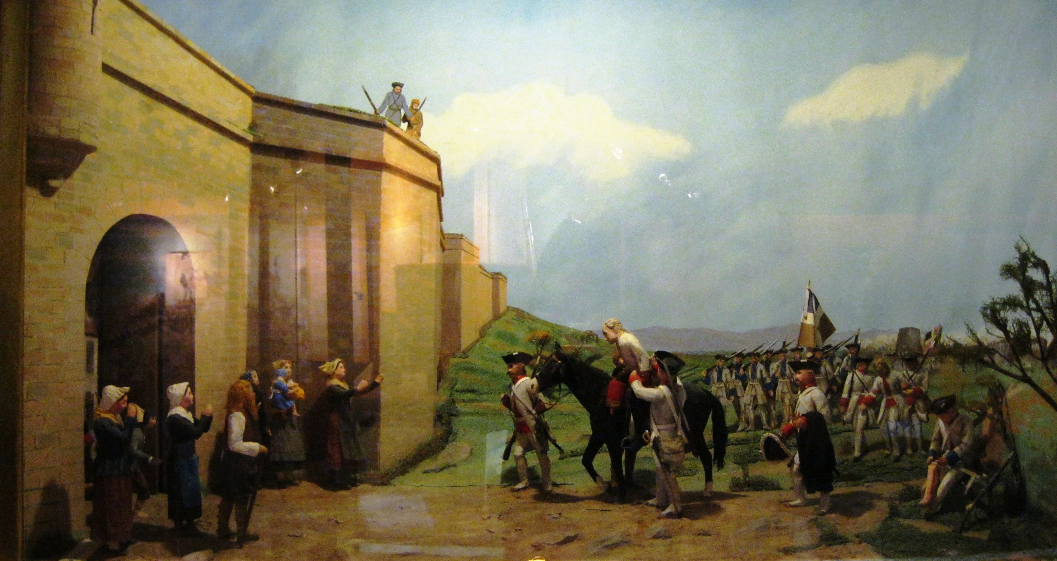 Diorama reconstituant une scène de la Bataille des plaines d'Abraham (13 septembre 1759), au musée du 22e Régiment, Citadelle de Québec.Il y est écrit : « Surpris par le débarquement des Britanniques à l'Anse-au-Foulon, Montcalm rencontre Wolfe et son armée sur les plaines d'Abraham. Le combat est violent mais bref. Wolfe est tué. Montcalm blessé est remené par la porte Saint-Louis. Il meurt et Québec capitule. »